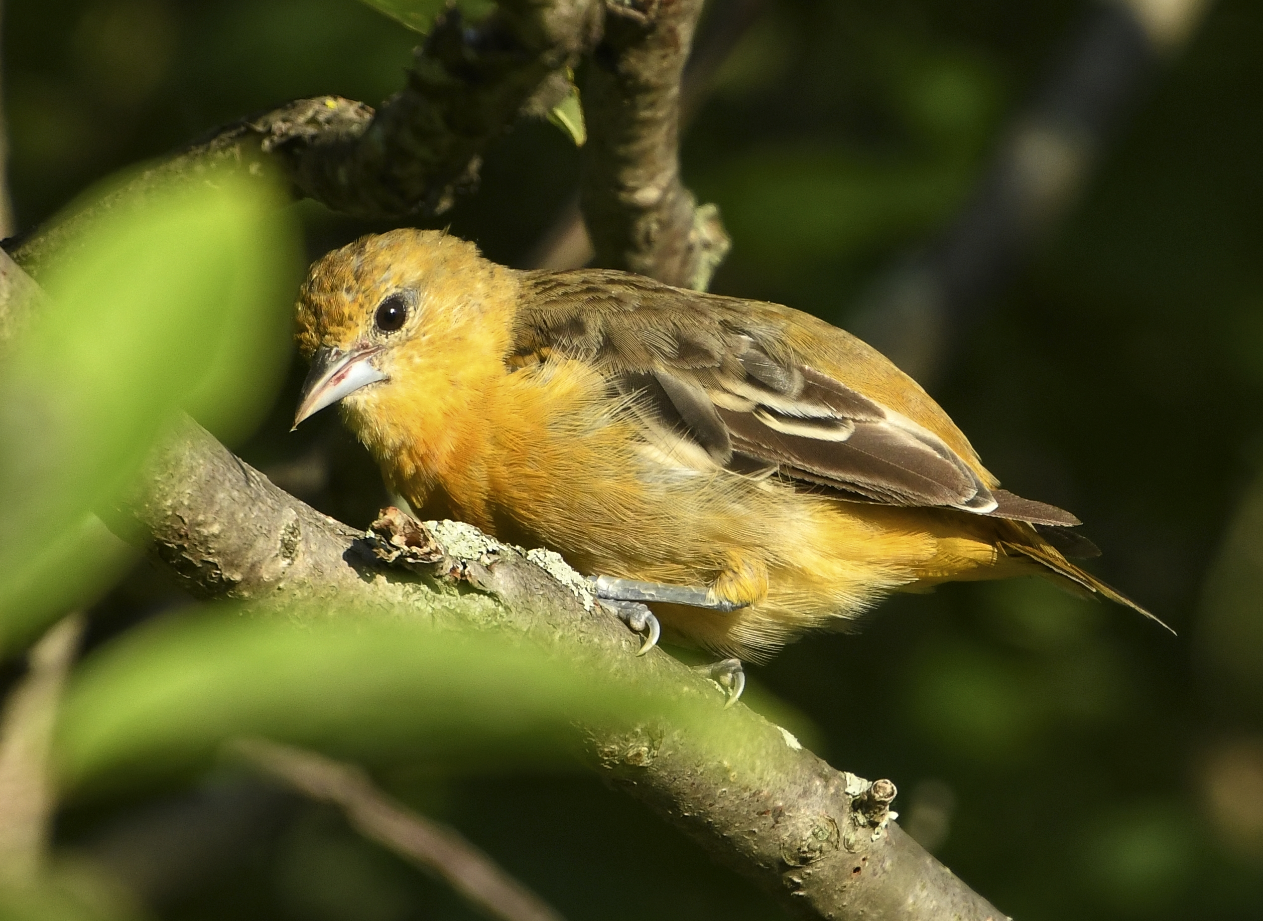 Молода особина трупіала балтиморського (Icterus galbula) у парку Полковника Семюела Сміта в Торонто